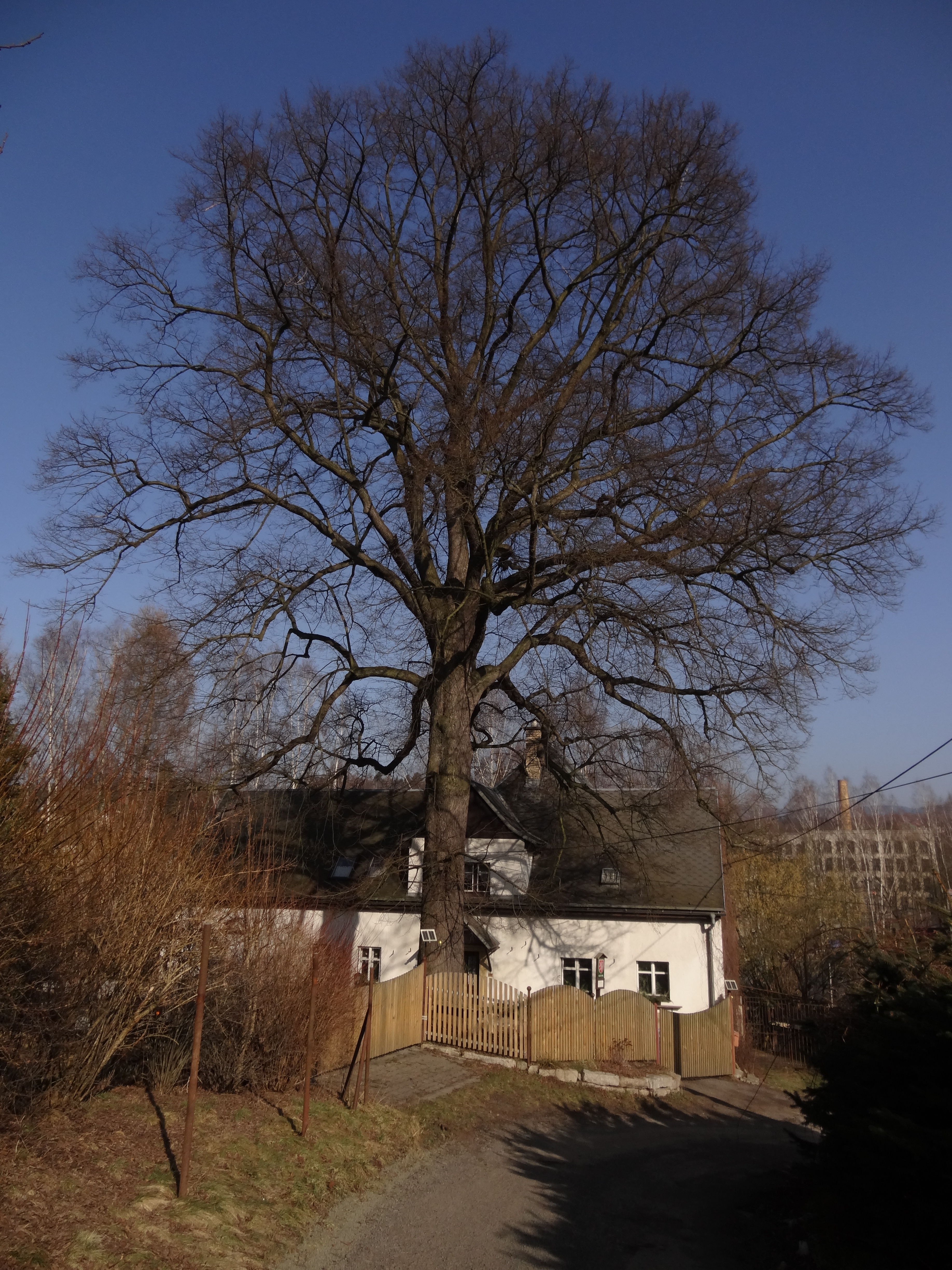 Liberec - památná lípa v ul. Na Mlýnku